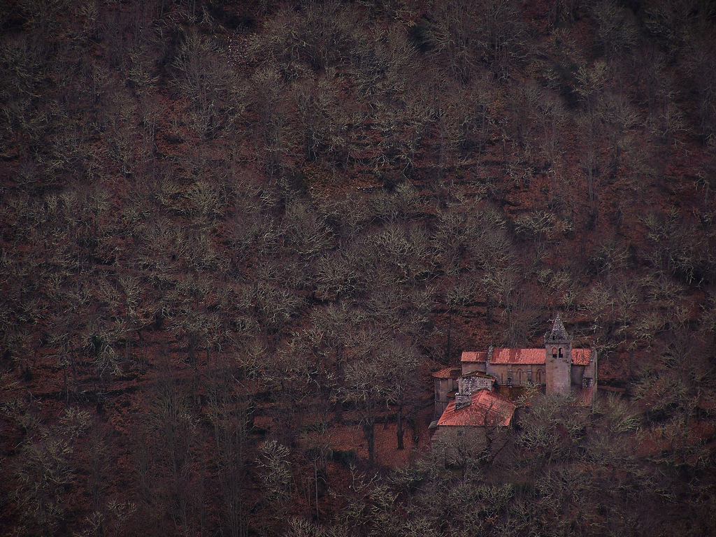 Mosteiro de Santa Cristina de Ribas de Sil, na aba do monte Varona, no lugar de Castro, pertencente á parroquia de Caxide (Parada de Sil).